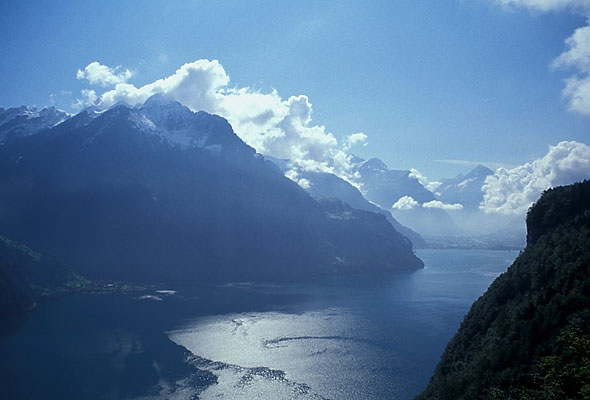 Blick von Seelisberg auf den Vierwaldstättersee (Urnersee) bis nach Flüelen